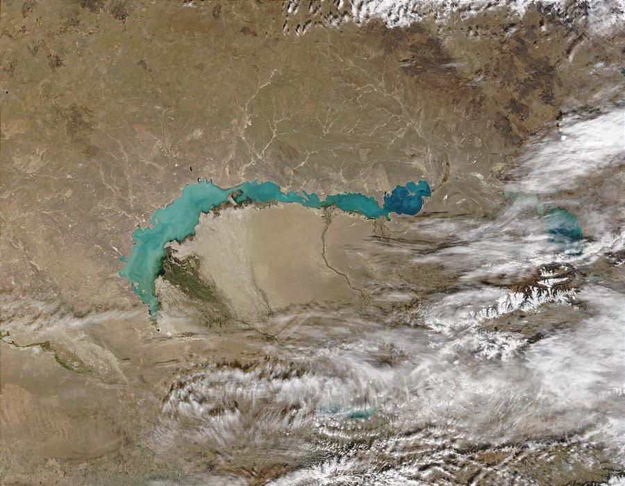 Satellitenaufnahme des Balchaschsees